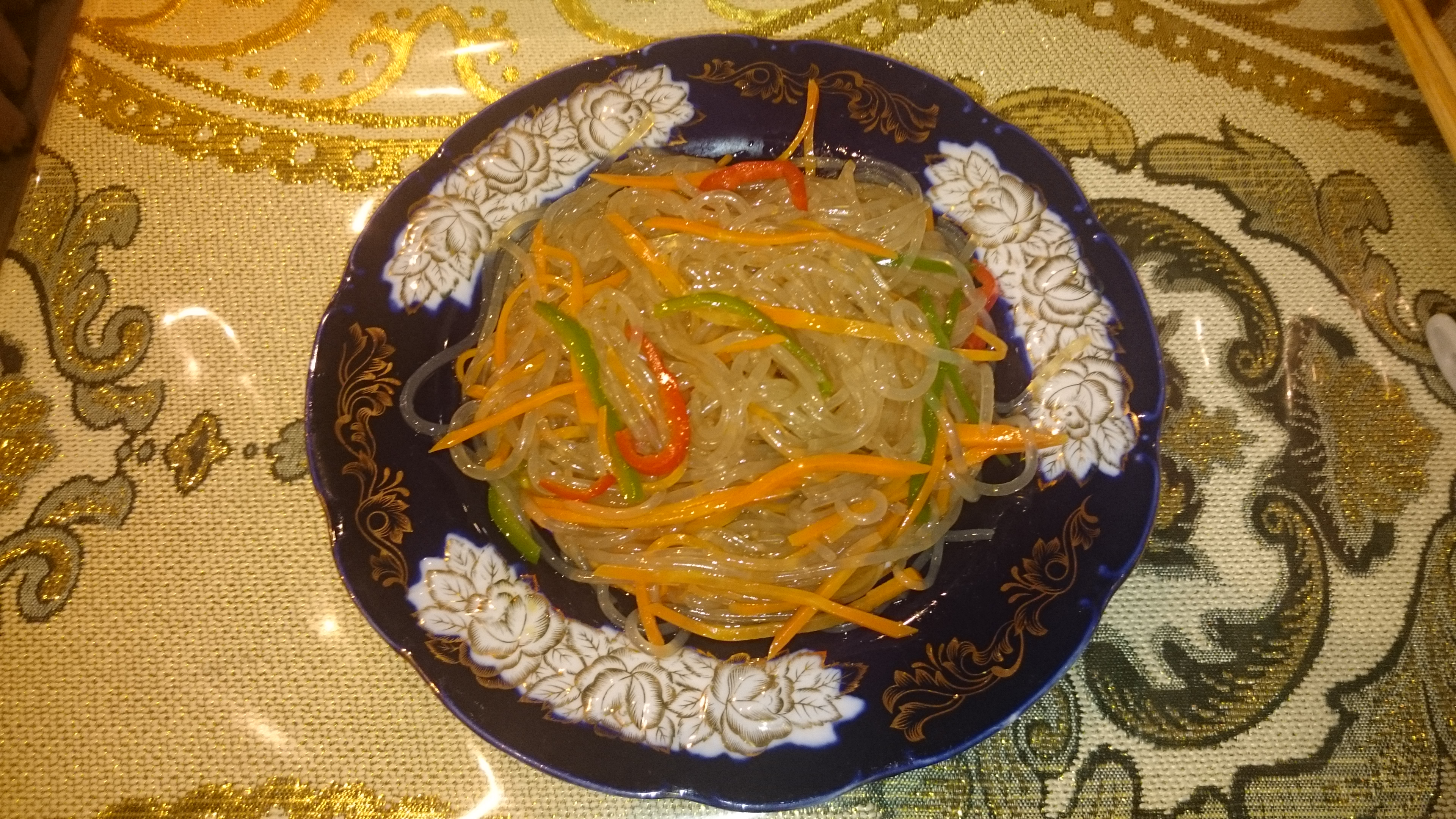 ウイグル式の春雨と人参のサラダ。